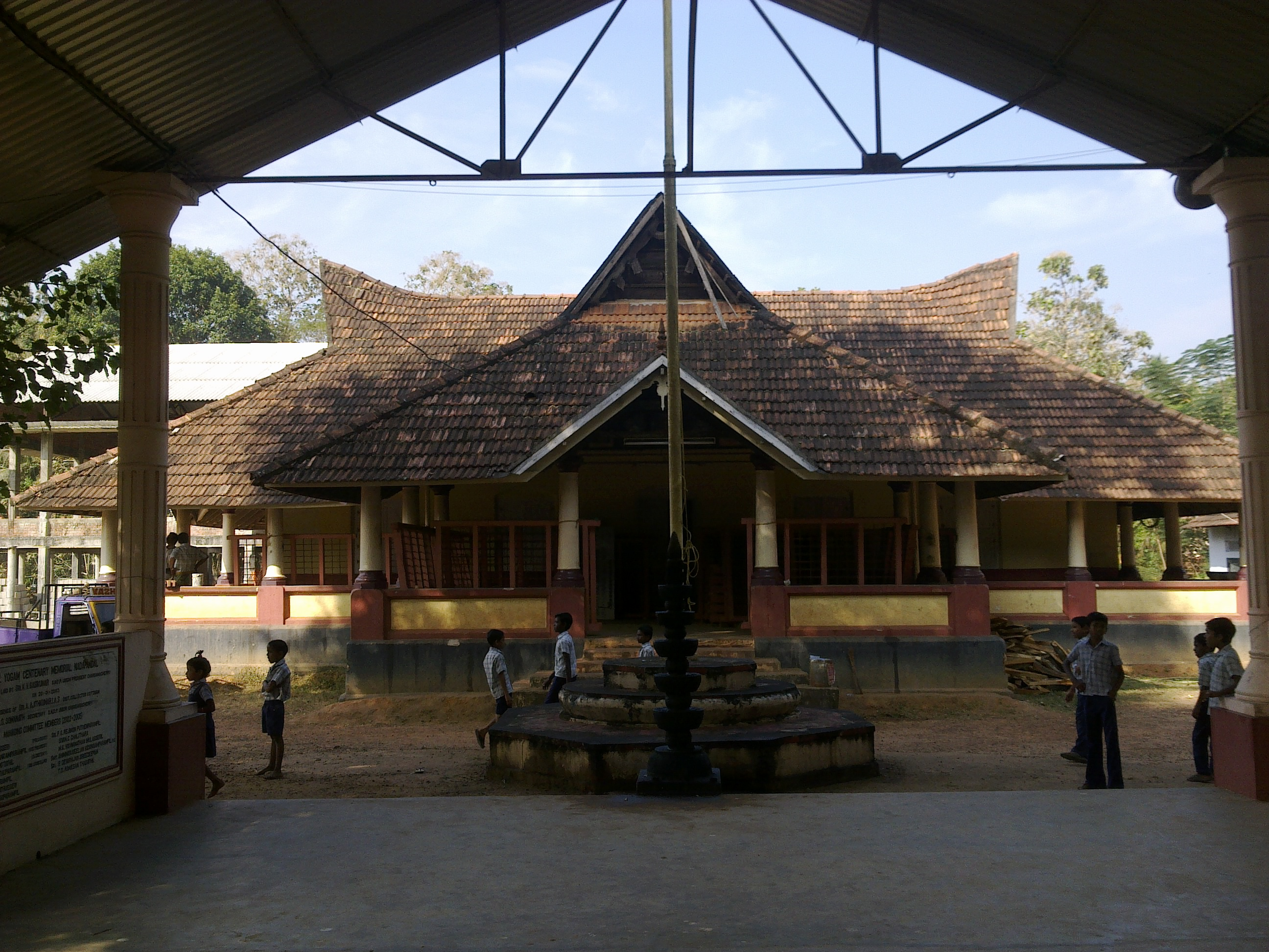 ആനന്ദാശ്രമം, വാഴപ്പള്ളി, ചങ്ങനാശ്ശേരി; ഗാന്ധിജി ഉത്ഘാടനം നിവഹിച്ച സ്കൂൾ